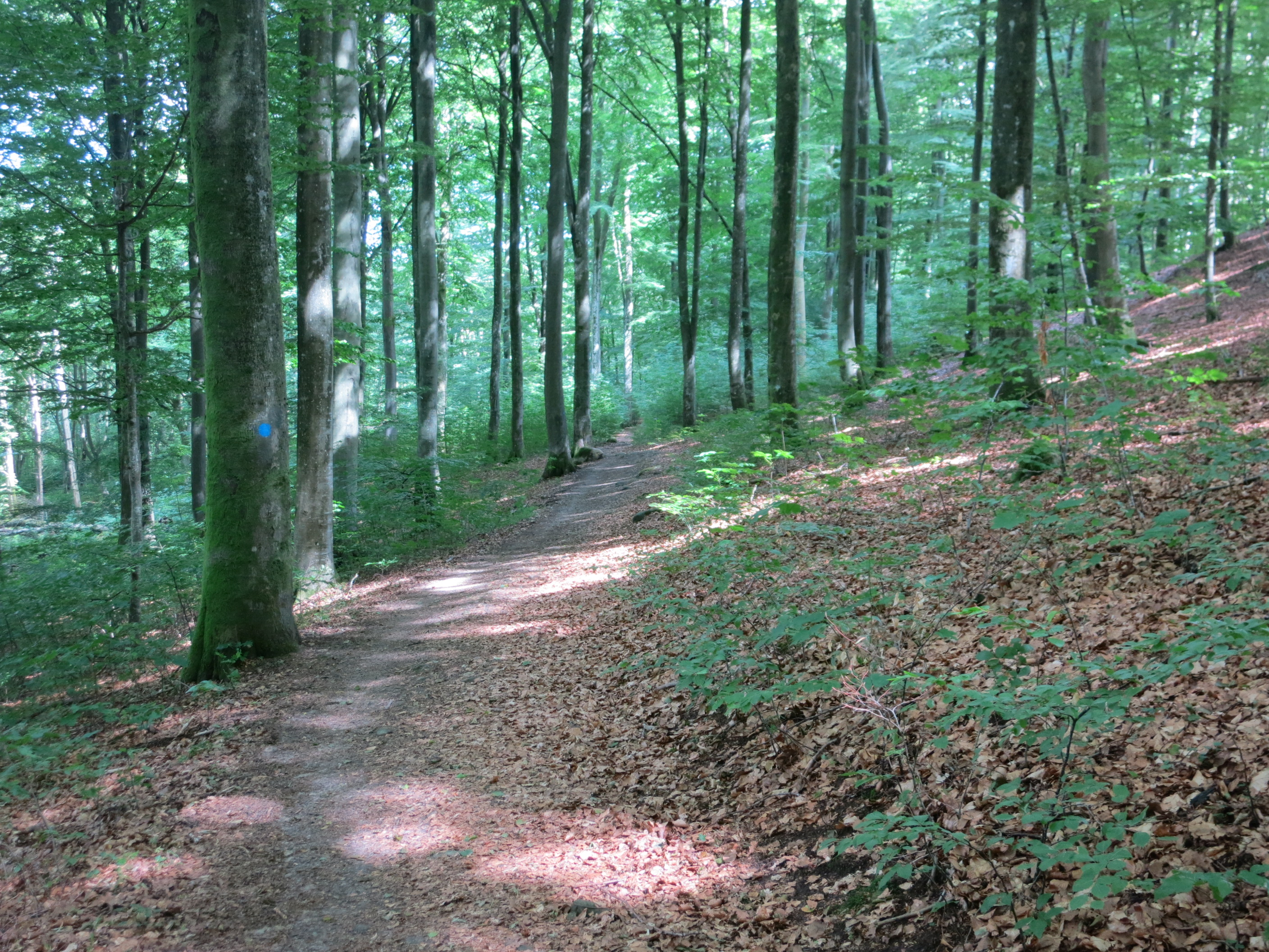 Naturreservat Osbecks bokskogar Laholms kommun